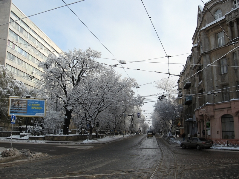 Улица Бандеры (Мира) во Львове, перекресток с улицами Александра Невского и Сталинградской битвы